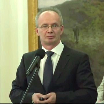 Prof. Krzysztof Szwagrzyk, historyk.